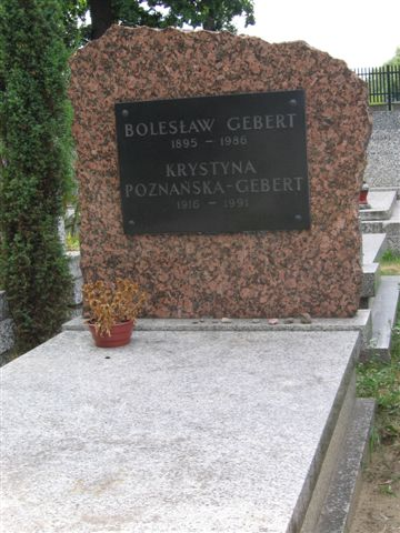 Bolesław Gebert's monument (Powązki Cemetery; Cmentarz Komunalny, d. Wojskowy)